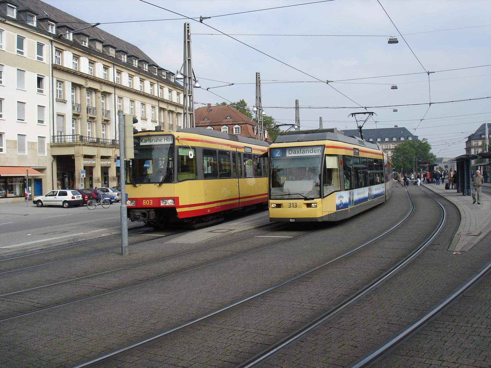 803 und 313 am Karlsruher Hauptbahnhof